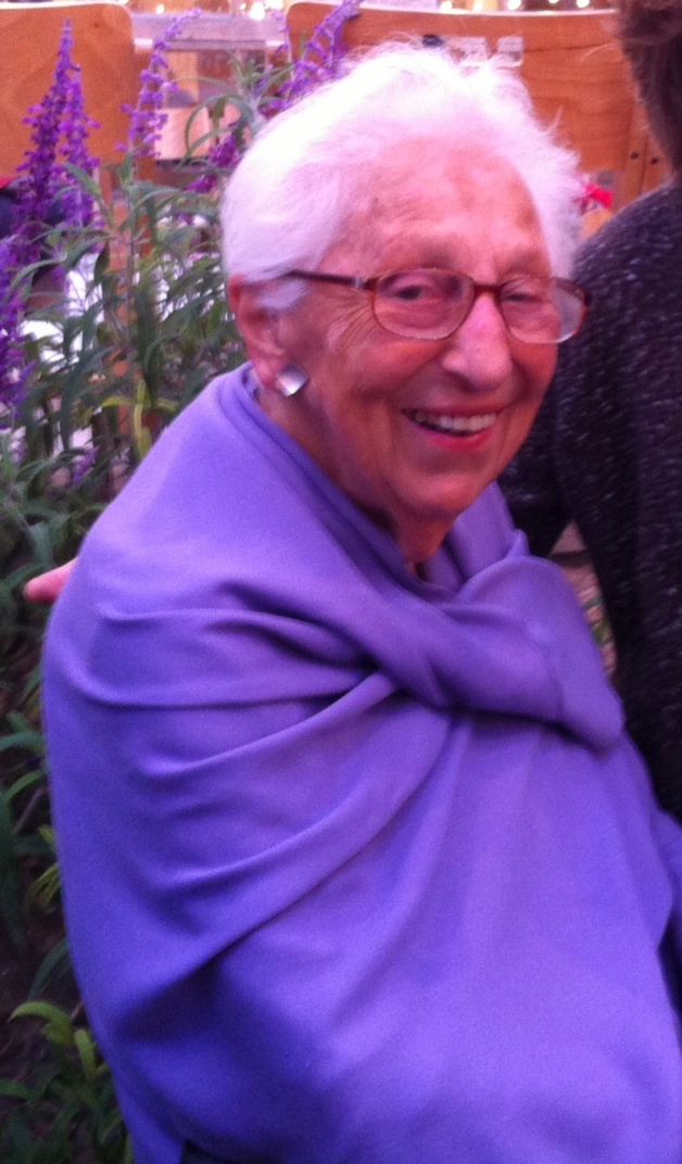 אליס שלוי ובברלי ברקת, ירושלים 2013